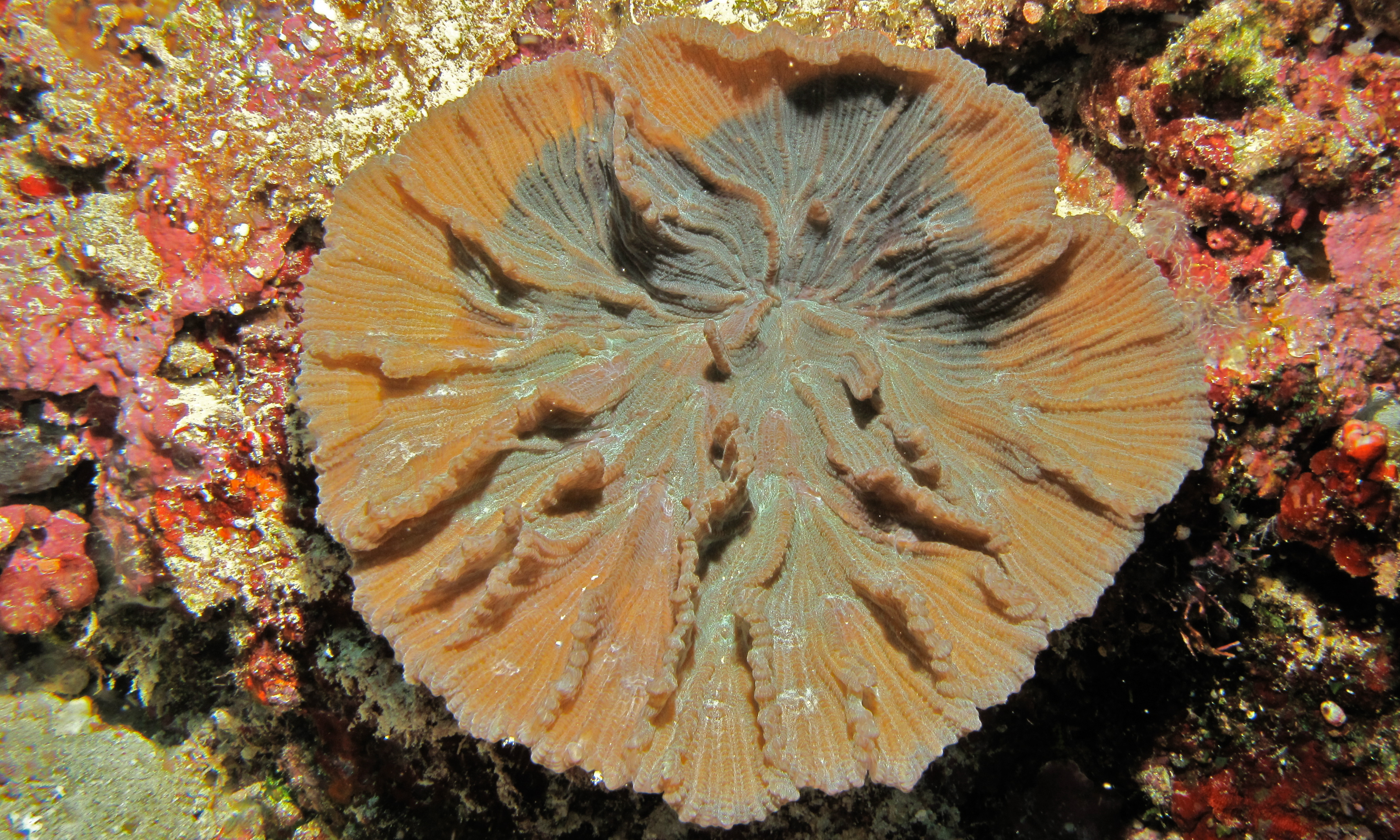 Timur I, Bunaken Island, Sulawesi, INDONESIA